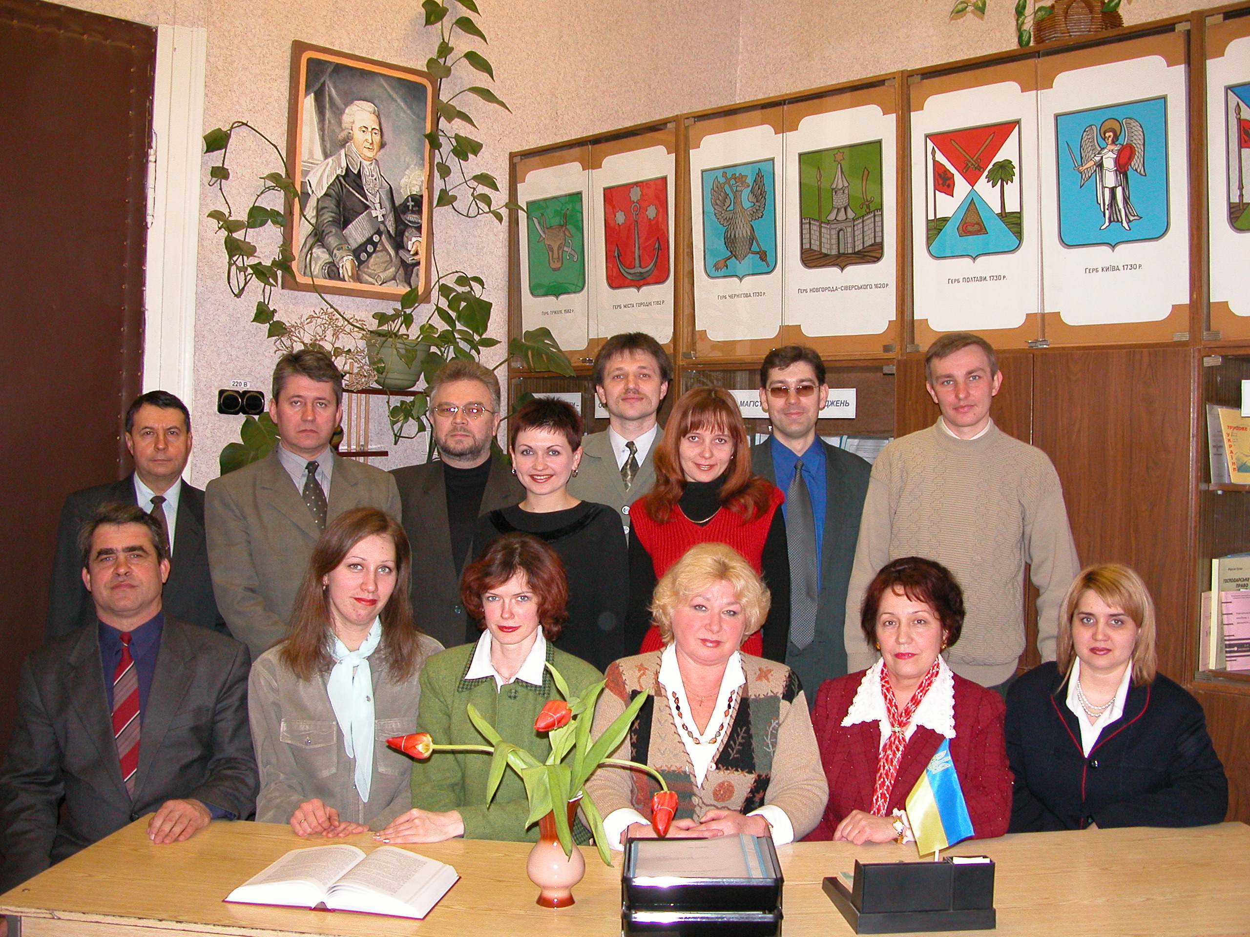 Кафедра історії України та правознавста, 2004 рік